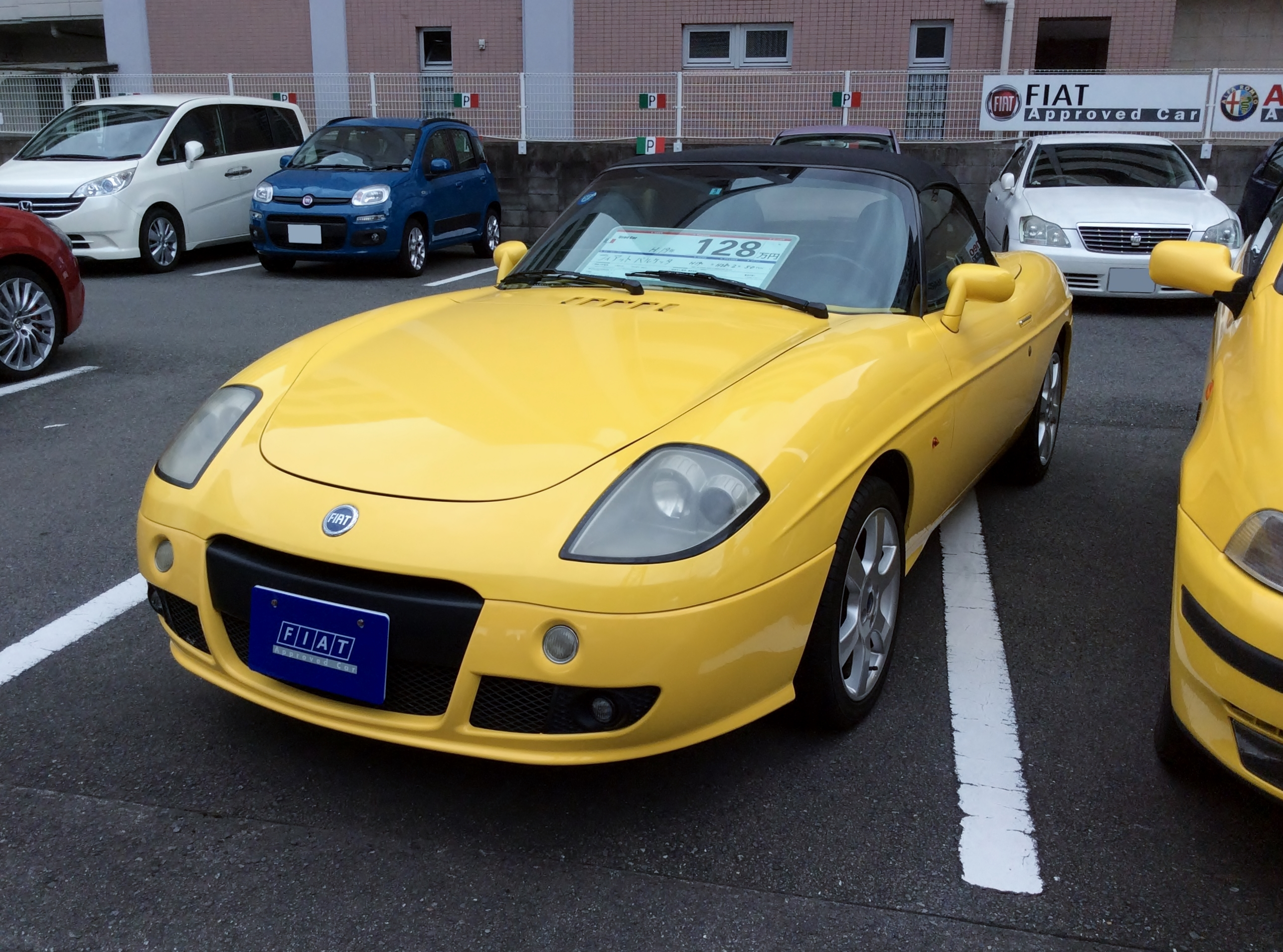 フィアット・ニューバルケッタをフロントから撮影。